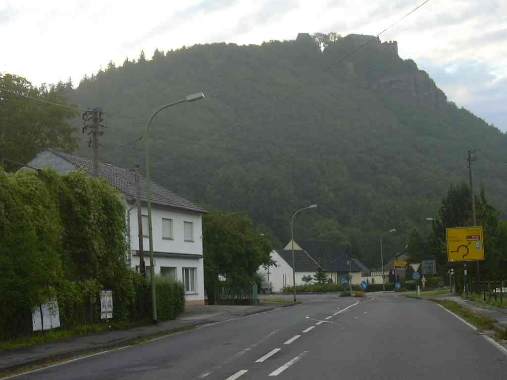 Brück (Nideggen), Ort mit Burg own work papa1234 2006-08-26